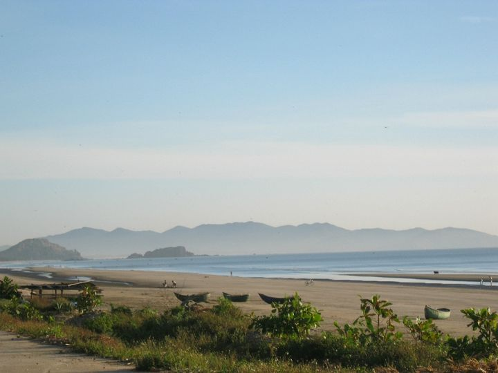 QN